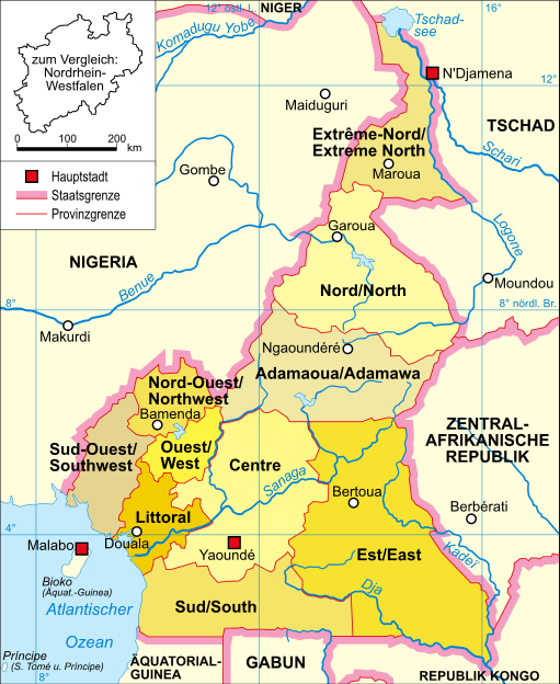 Bildbeschreibung: politische Karte von Kamerun Zeichner: Domenico-de-ga Datum: 15. Dezember 2005